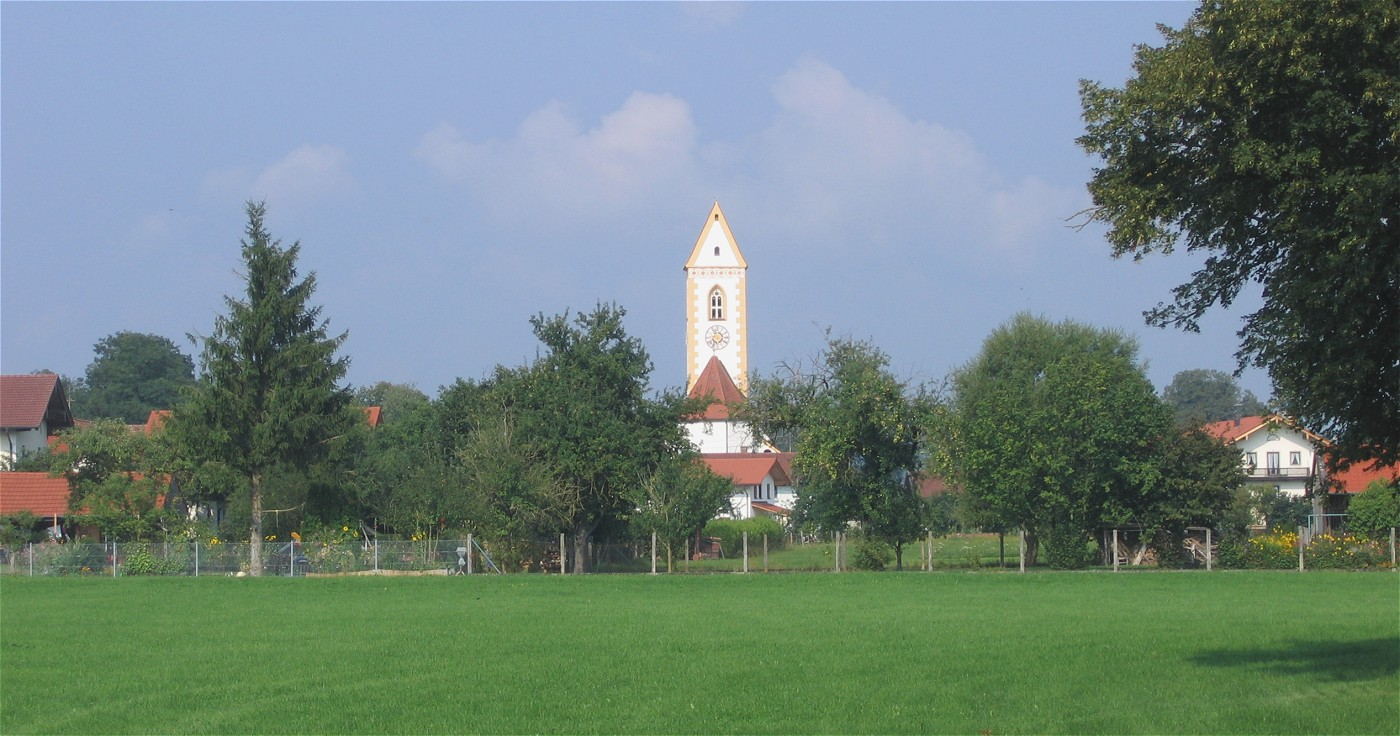 Högling, Bruckmuehl